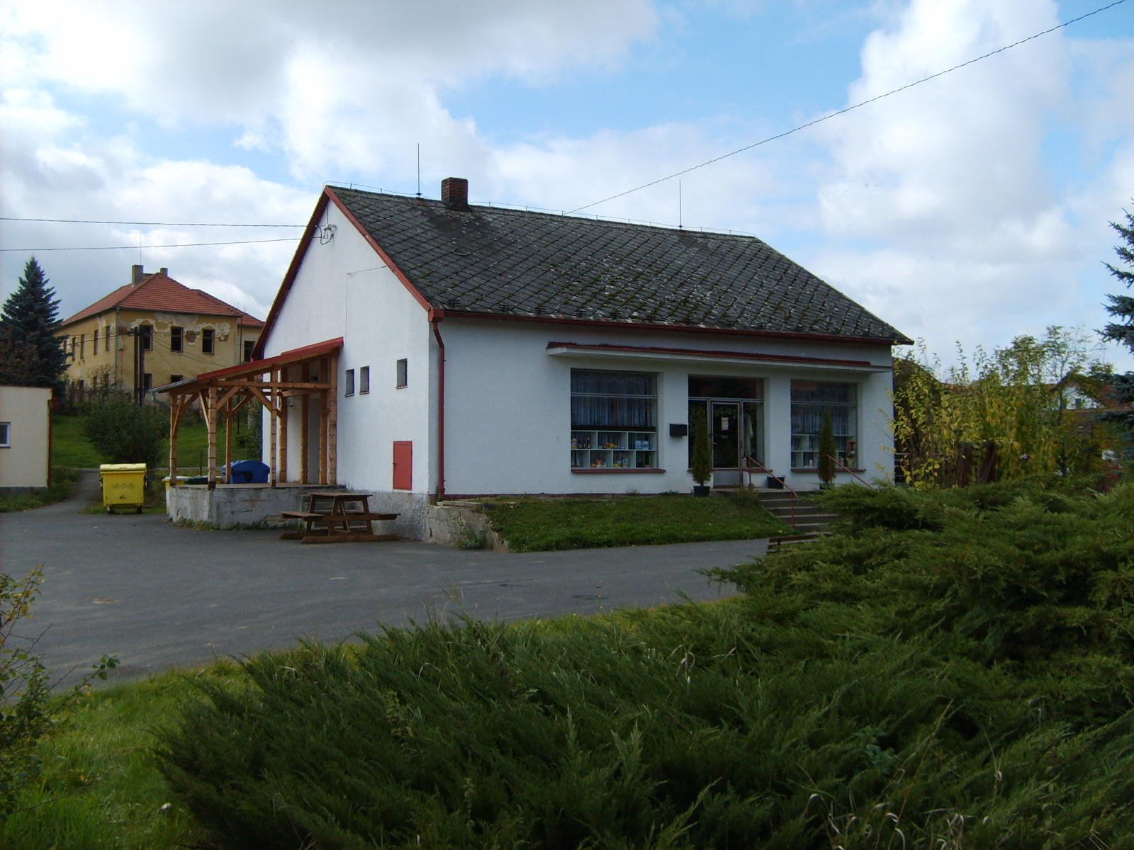 Shop in Studený.